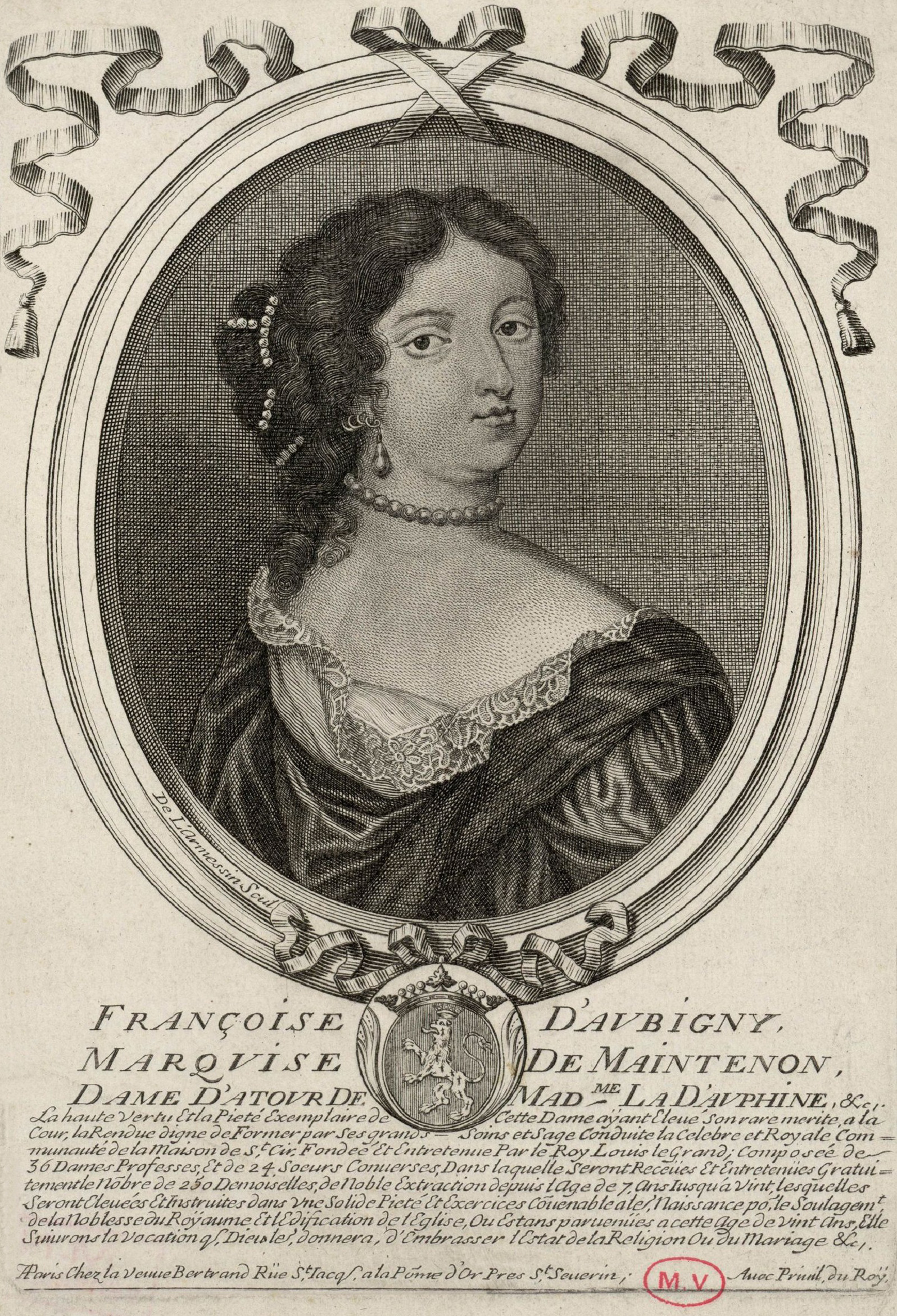 Stich mit dem Porträt Madame de Maintenons